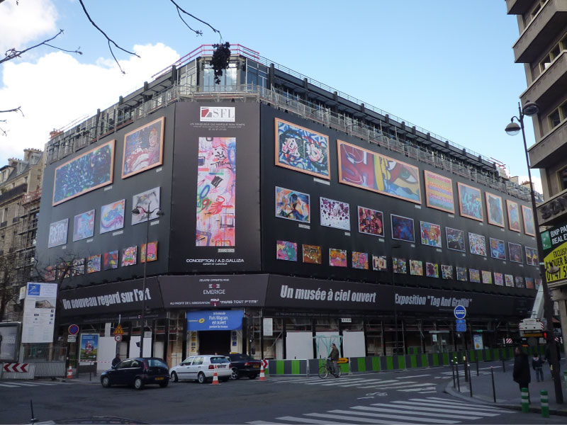 Echafaudage recouvert d'une bâche muséale noire de 2000 m2 servant de support à l'exposition en plein air des pionniers américains et européens du graffiti intitulée Tag et Graffiti, organisée par Alain Dominique Gallizia. Niches-ateliers aménagées au pied de l'immeuble pour l'évenement Tag en direct. La Poste Wagram (en restructuration), angle de l'avenue de Prony et de l'avenue Wagram, XVIIe arrondissement, Paris, France.